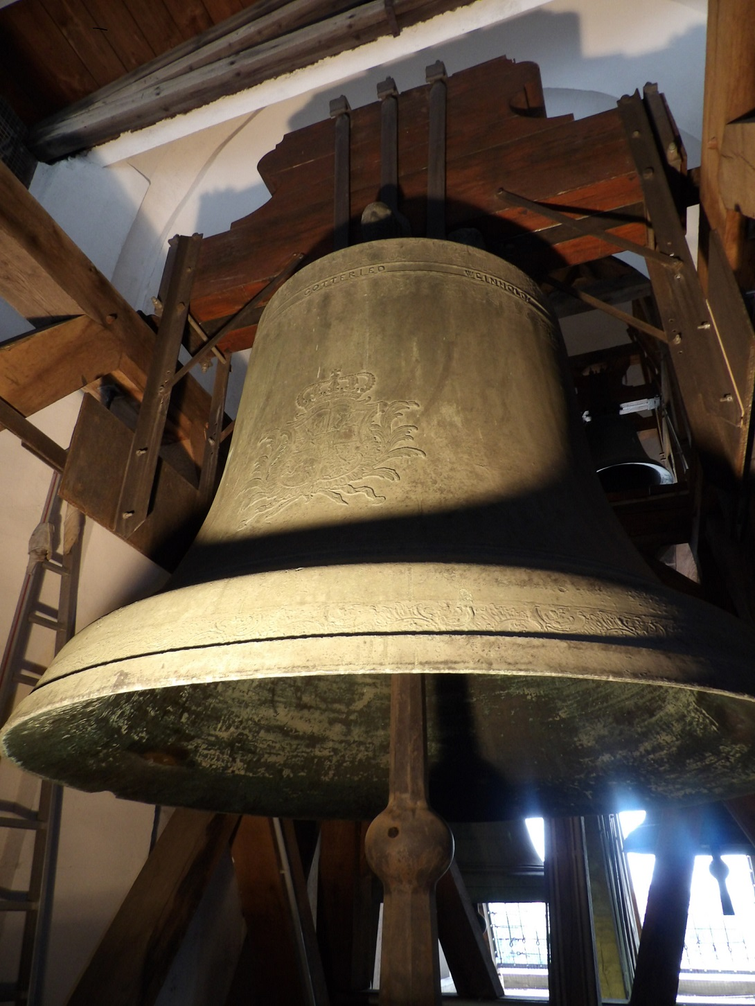 Die größte Glocke der Dresdner Kathedrale